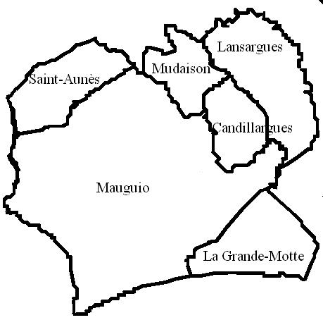 Le Canton de Mauguio Image personnelle